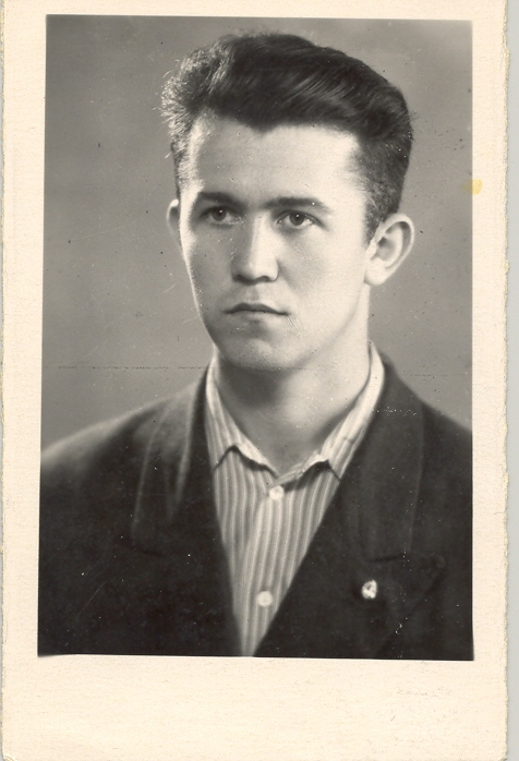 Gheorghe Munteanu